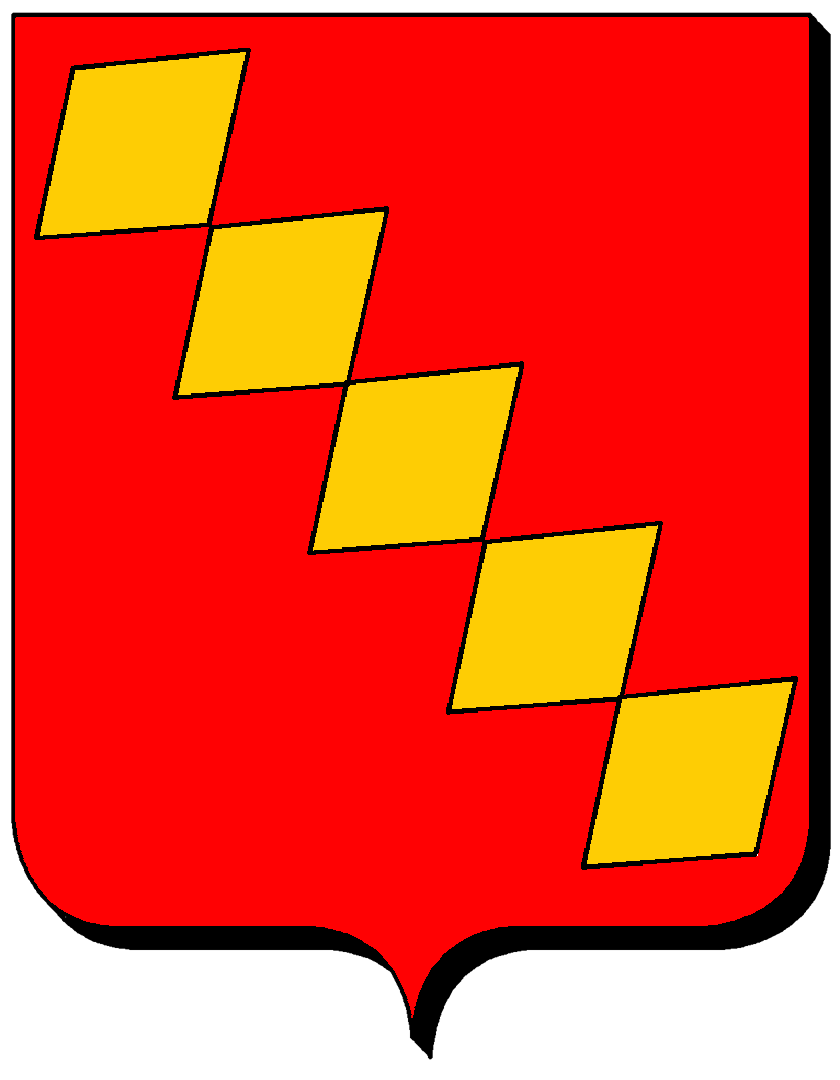 Blason de Heilly: De gueules, à une bande fusellée d'or.